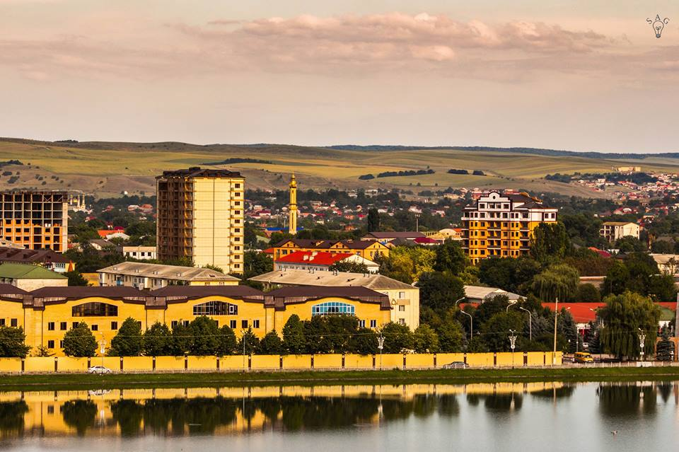 Городской пруд города Назрань, ЦАО